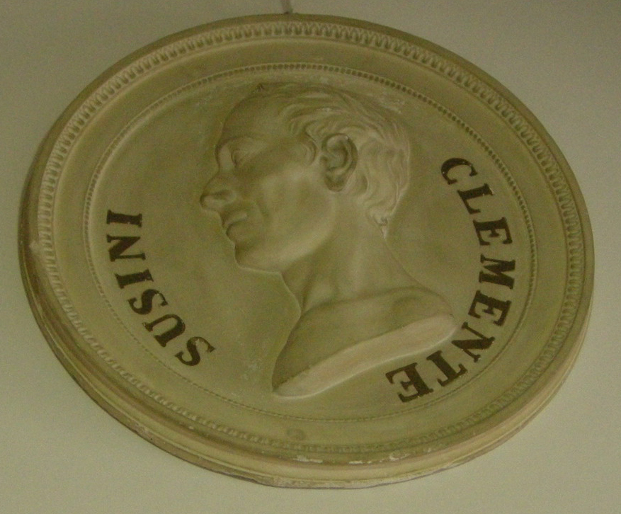 Specola, medaglione di clemente susini